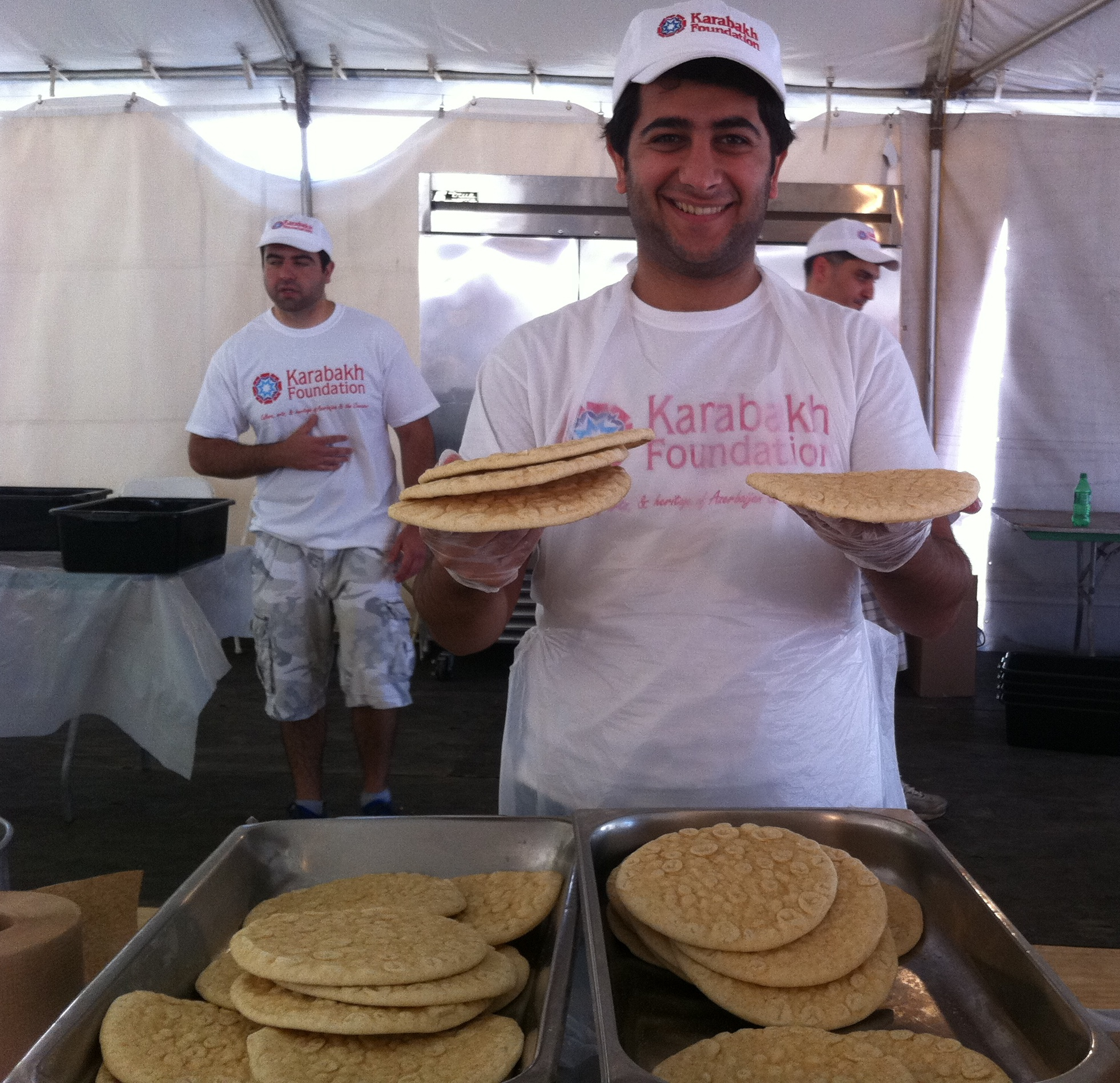 Vaşinqtonda Smitsonian Folklor Festvalında Azərbaycan yeməkləri pavilyonu. Bu festivalda Azərbaycan mədəniyyətinin təmsil edilməsi ABŞ-ın Qarabağ Fondunun səyləri nəticəsində mümkün olmuşdur.